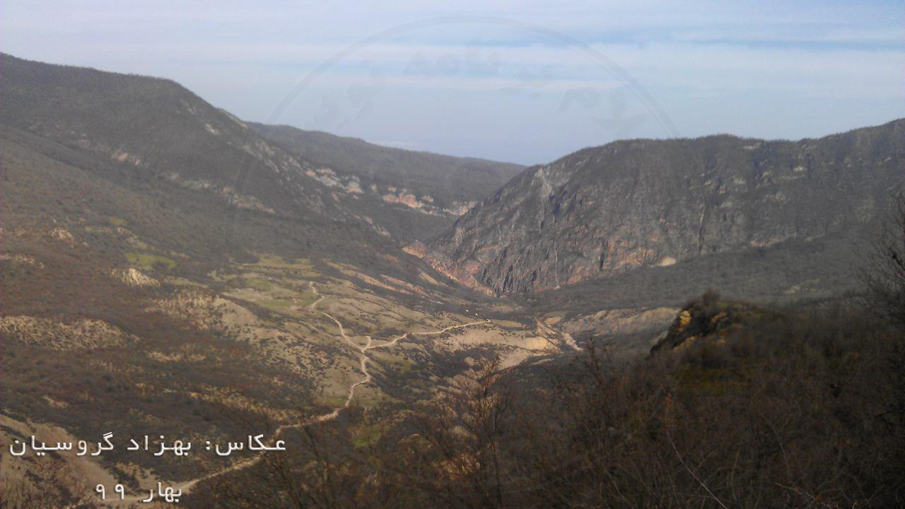 تصویر منطقه نهرودبار کدیر-بهزاد گروسیان